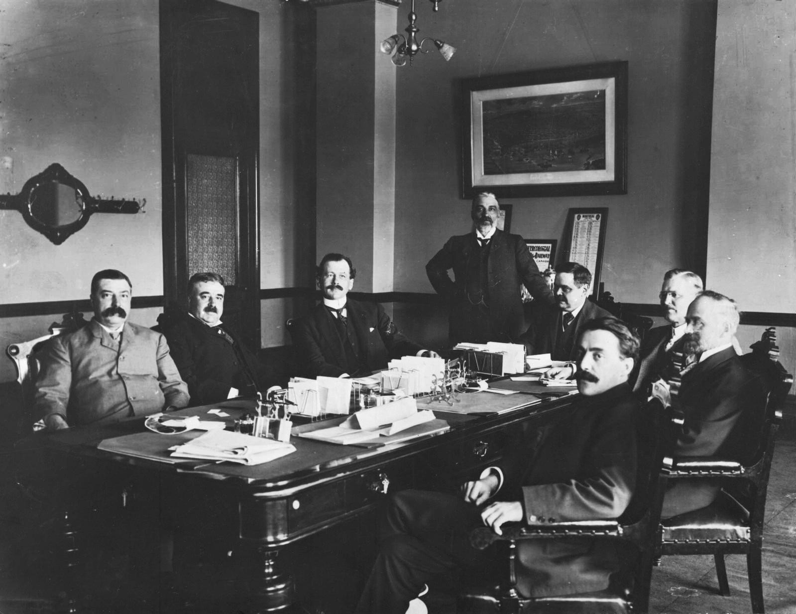 Gouvernement Lomer Gouin (Québec) vers 1905. À partir de la gauche, dans le sens horaire autour de la table : Louis-Jules Allard, Louis-Rodolphe Roy, Adélard Turgeon, William Alexander Weir, Lomer Gouin, John Charles McCorkill, Auguste Tessier, Jean Prévost. La photographie pourrait vraisemblablement être de l'été ou de l'automne 1905, puisqu'on y voit Jean Prévost (nommé le 3 juillet 1905) mais pas John Charles Kaine (nommé le 3 janvier 1906). Lomer Gouin (né le 19 mars 1861 à Grondines et mort le 28 mars 1929 à Québec) est un homme politique québécois. Il dirigea le Parti libéral du Québec et fut Premier ministre du Québec de 1905 à 1920.